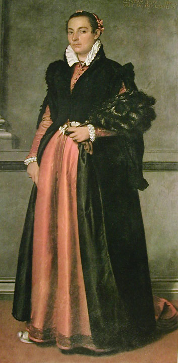 Portrait of Pace Rivola Spini by Giovanni Battista Moroni, 1570